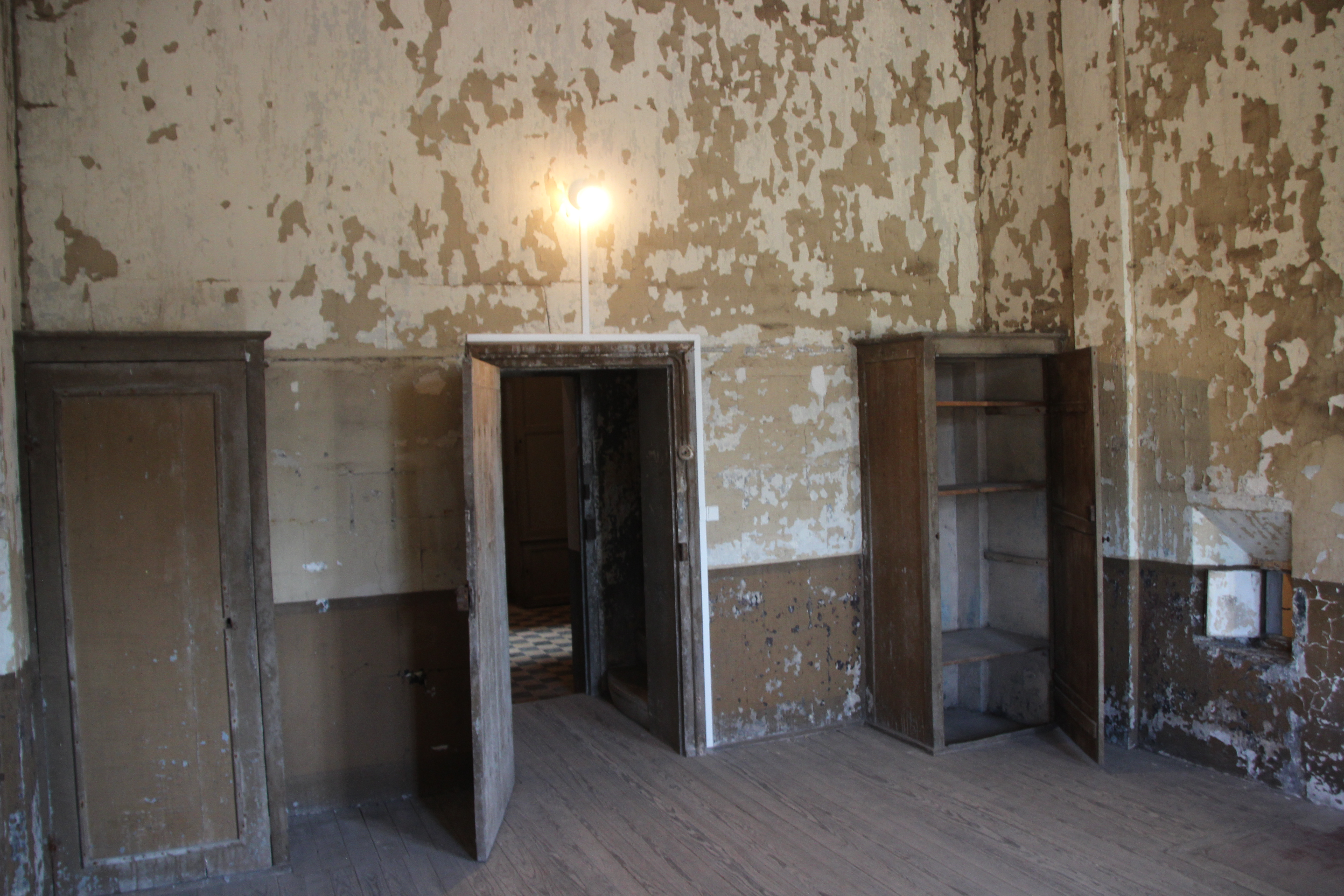 Ancienne prison (Pont-l'Évêque, Calvados)